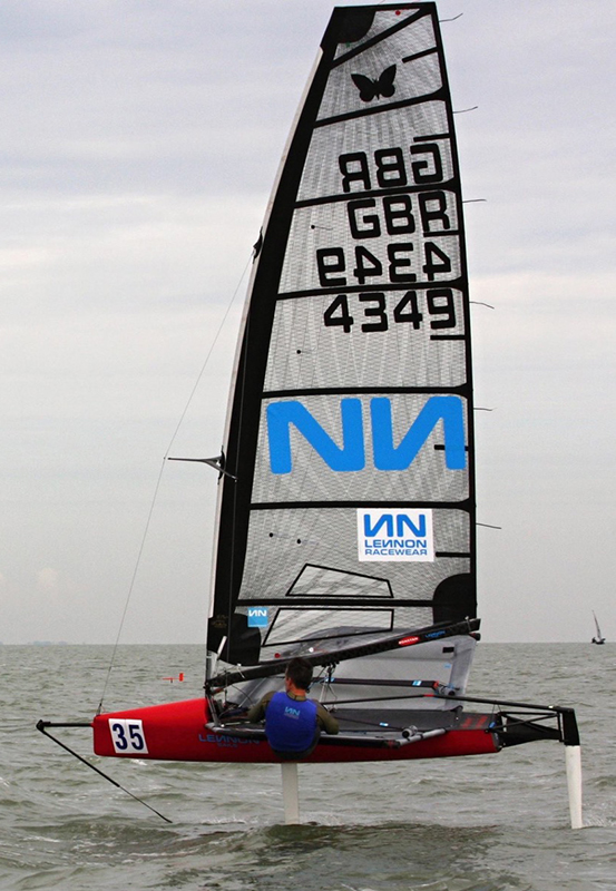 International Moth, Lennon Sails